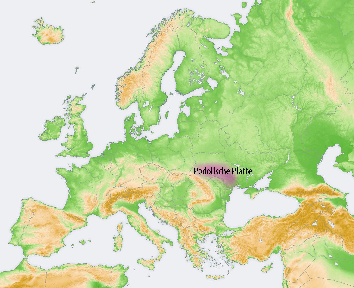 Landschaften der Osteuropäischen Ebene: Podolische Platte